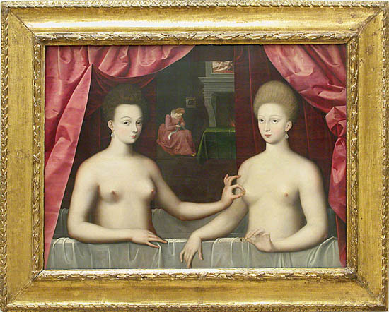 Painting Portrait présumé de Gabrielle d'Estrées et de sa soeur la duchesse de Villars